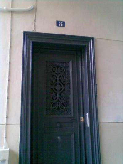 Le 4 passage de la Ferme-Saint-Lazare (Paris 10), numéroté 5